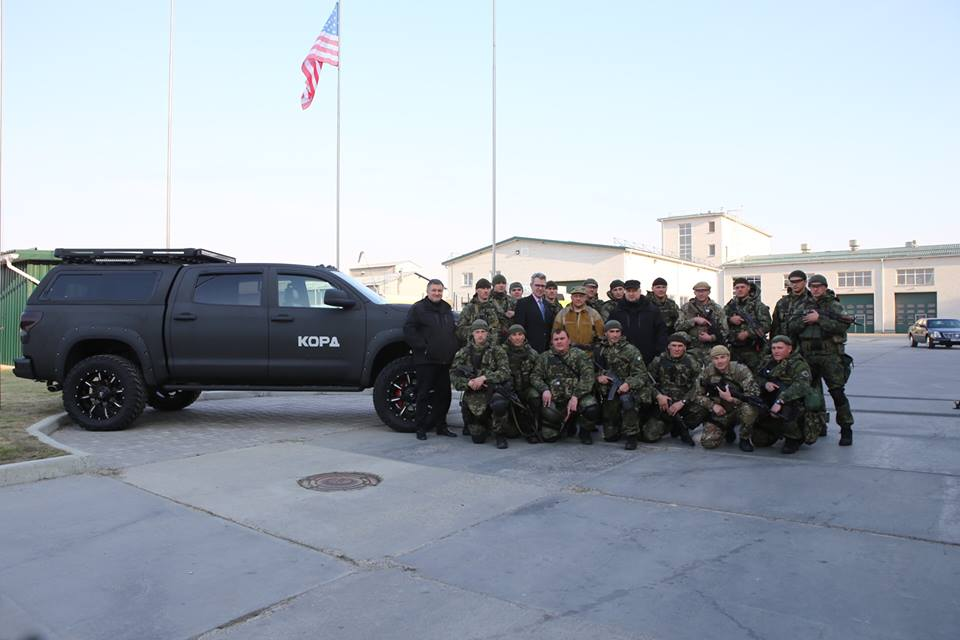 КОРД (укр. Корпус Оперативно-Раптової Дії, рус. Корпус оперативного внезапного действия) — специальное подразделение быстрого реагирования Национальной полиции Украины.